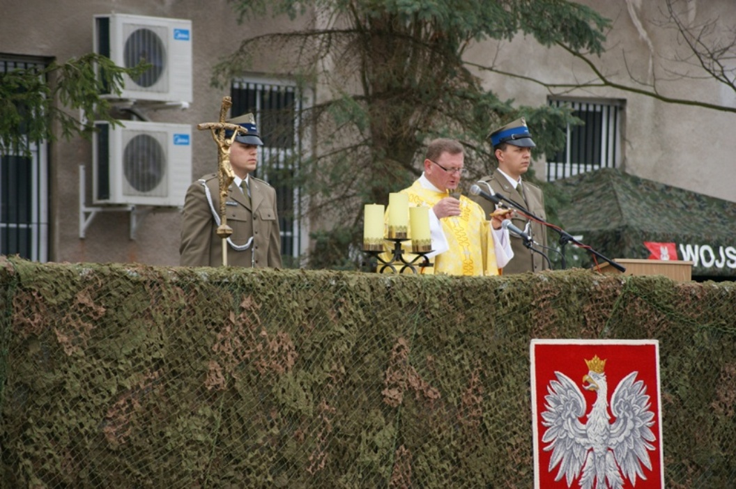 Garnizon Przasnysz, 2015 r.